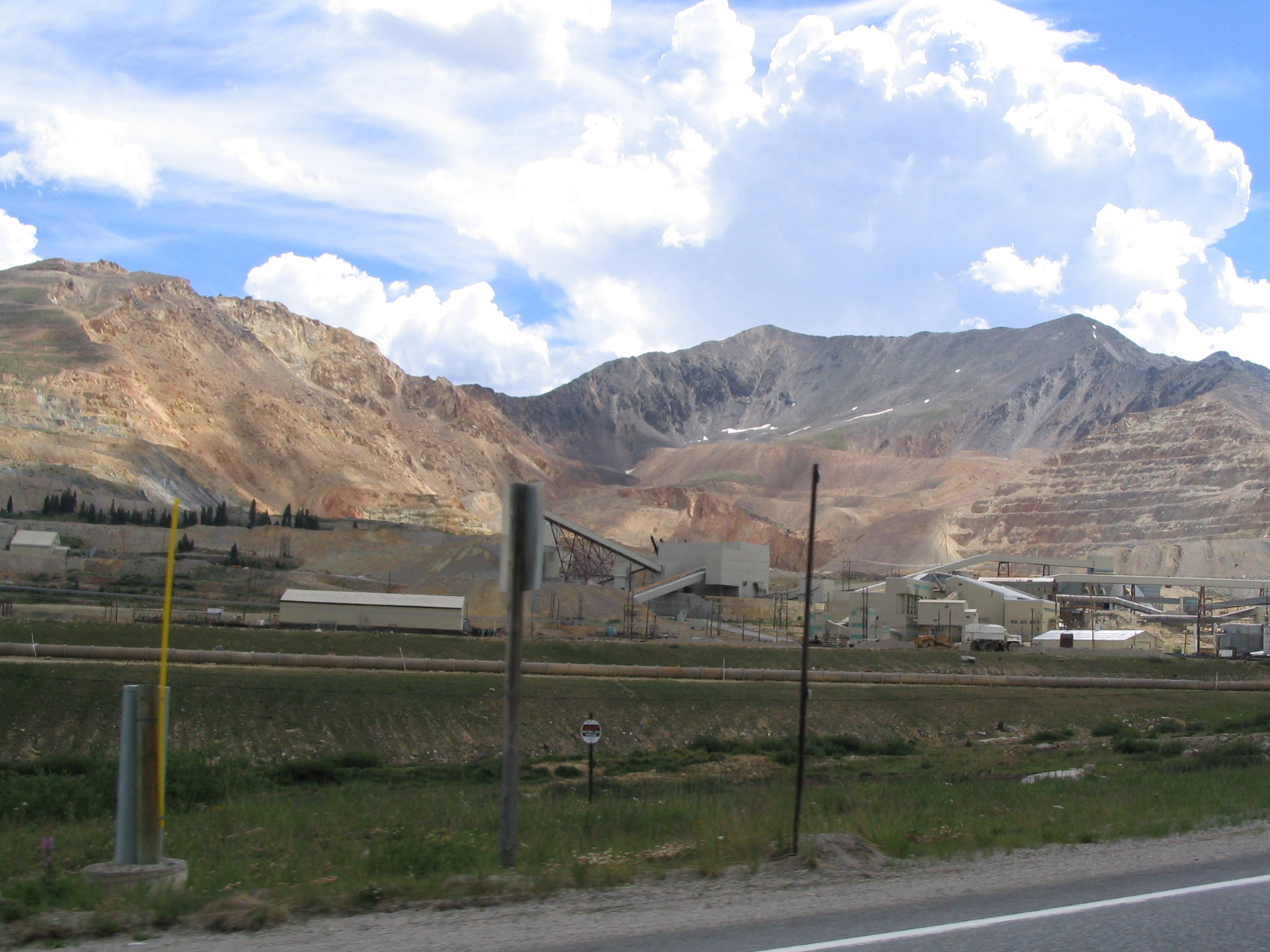 Climax mine near Leadville, Colorado